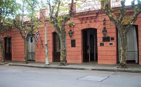 Museo Histórico Casa de Rivera